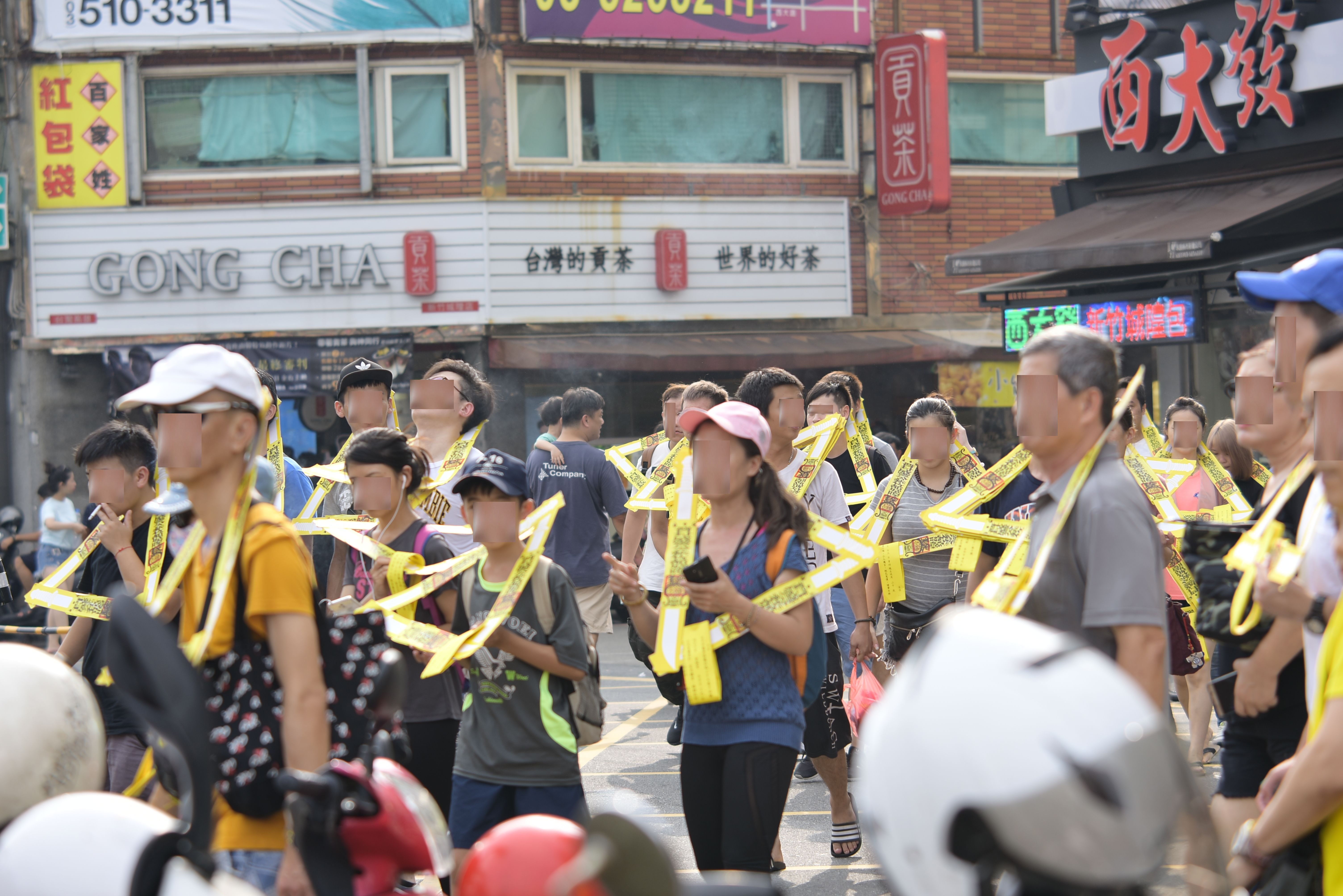 2018 Hsinchu City God Temple 農曆七月初一日脫枷消業植福法會 新竹都城隍廟